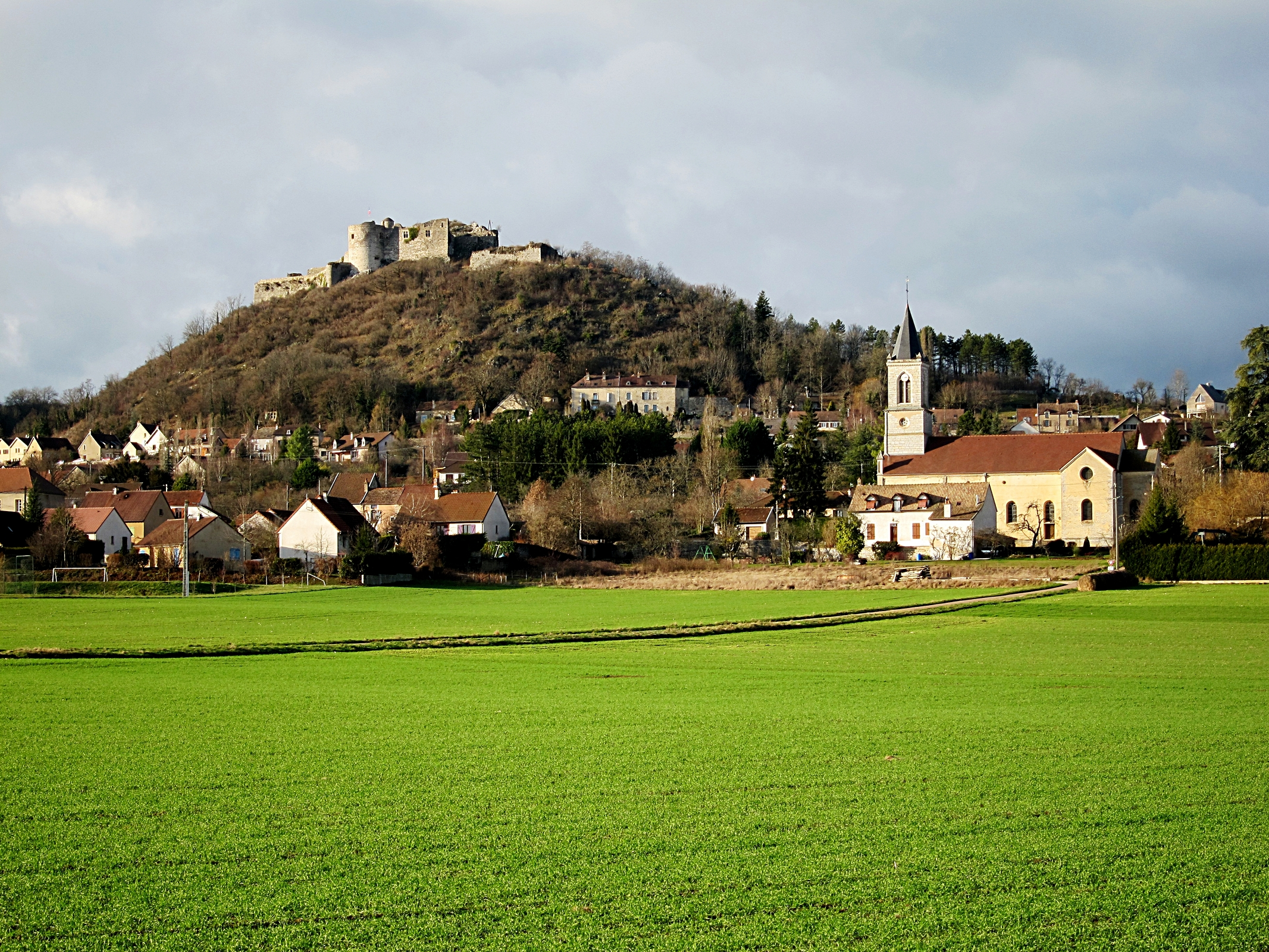 Le château et l'église de Mâlain (Côte-d'Or).